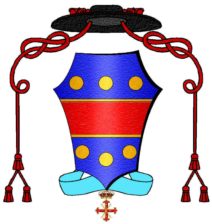 Armes de l'abbé Franck-Marie Quoëx (1965-2007), chevalier ecclésiastique de l'Ordre sacré et militaire constantinien de Saint-Georges